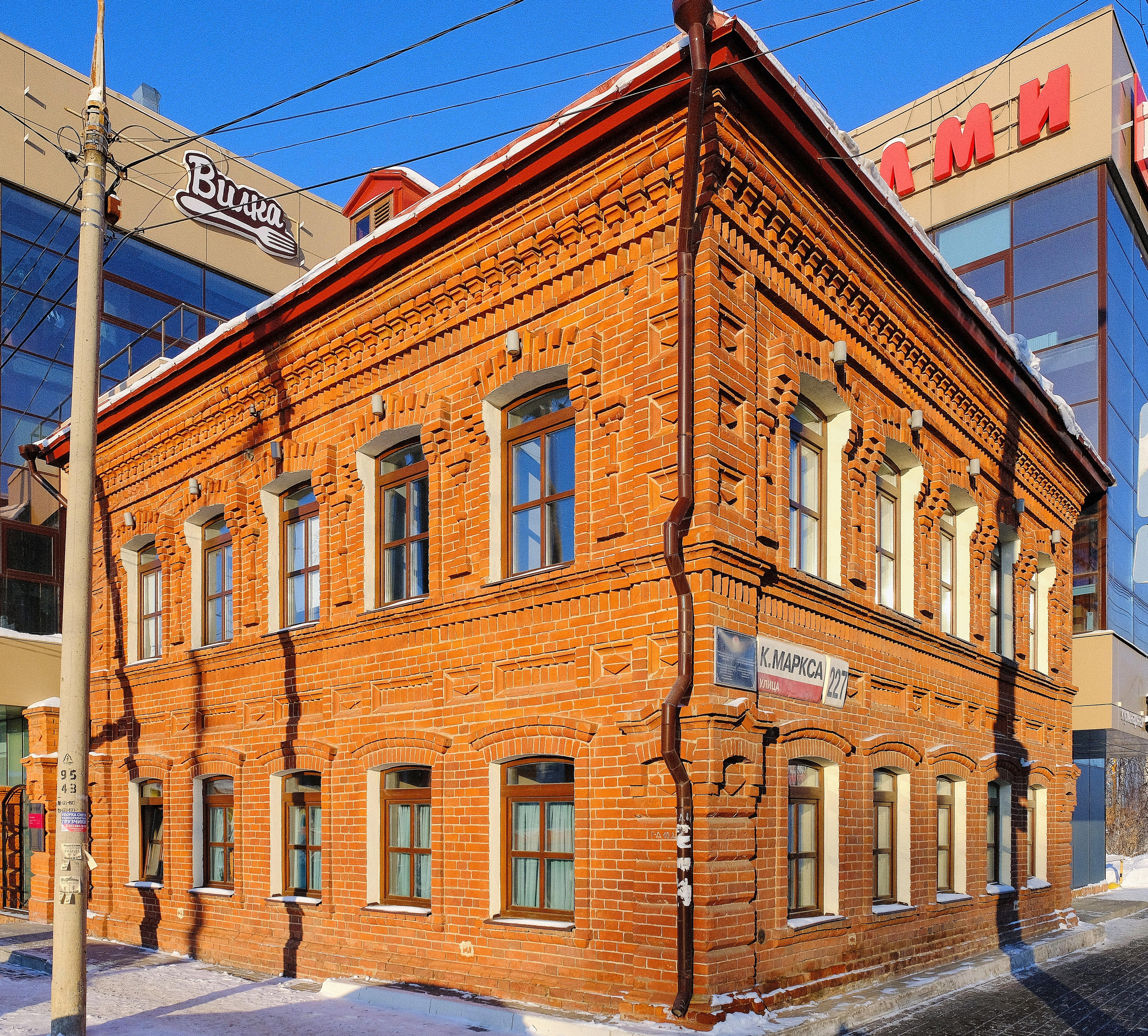 Дом мясника Слободчикова в Ижевске (ул. К. Маркса, 227)